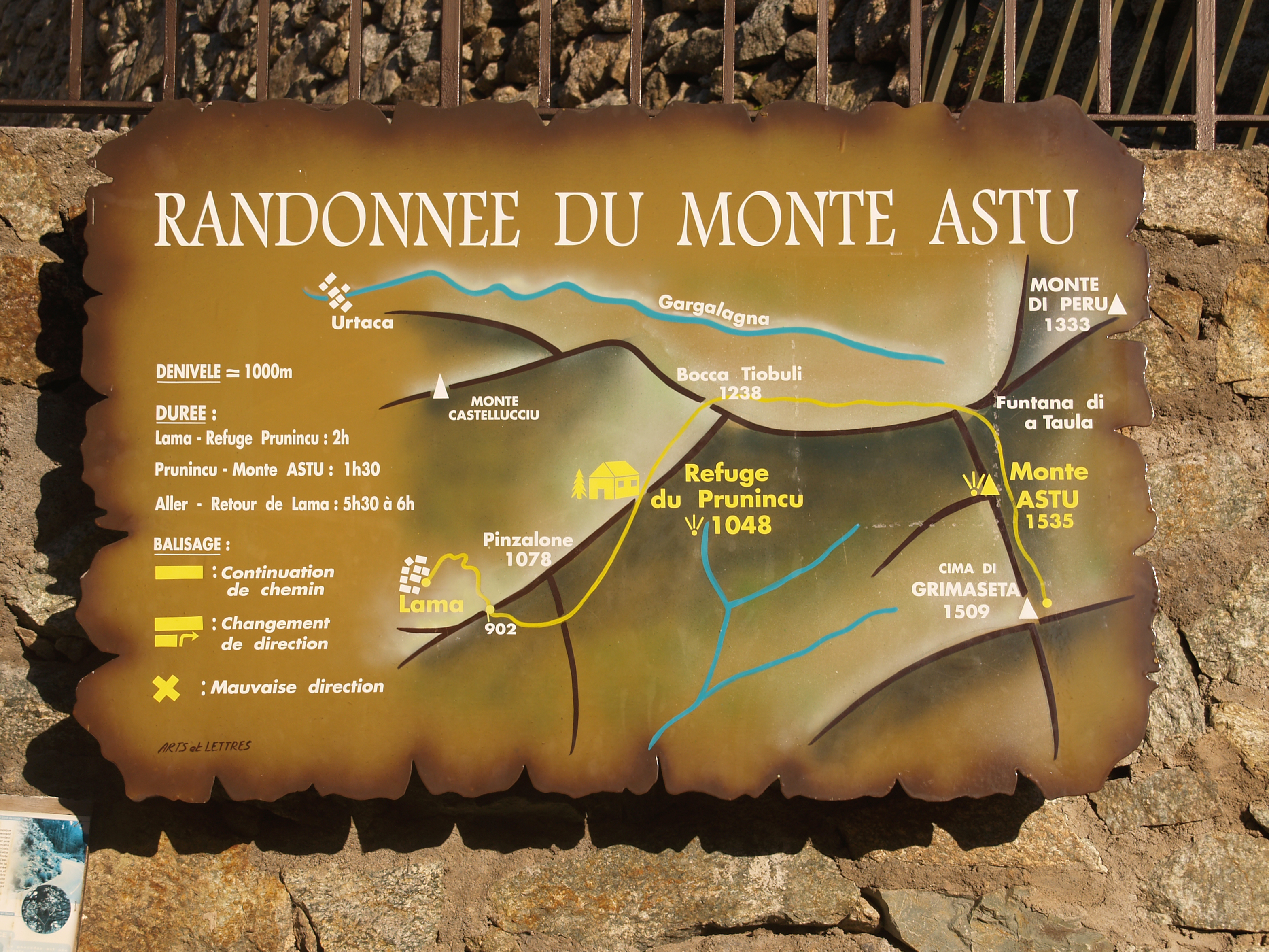 Lama (Corsica) - Panneau Randonnée au Monte Astu